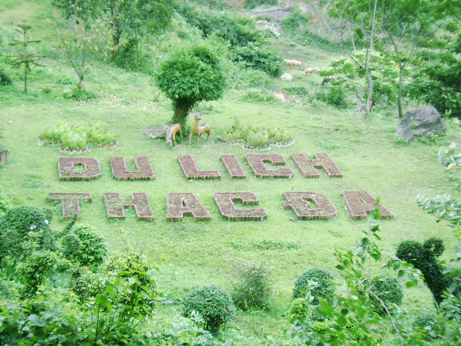 Chụp khu thác Đa.